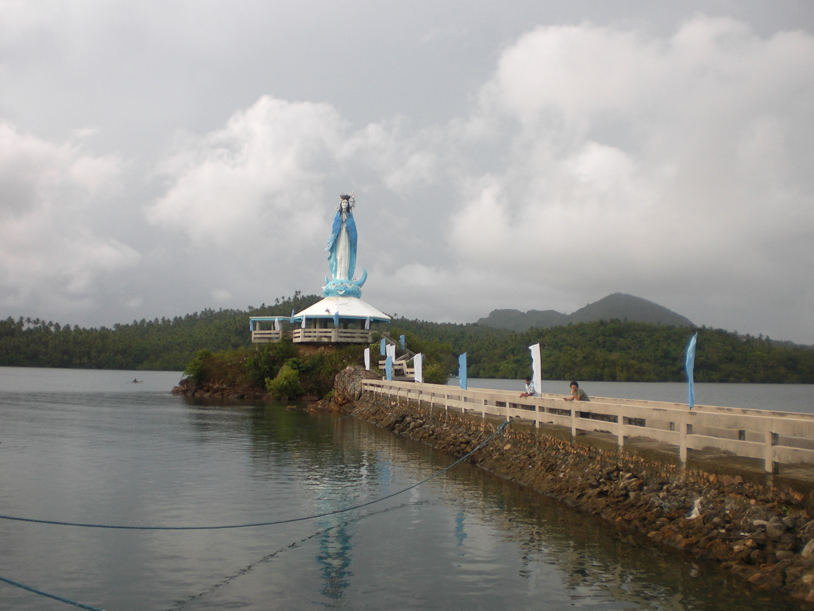 Mogpog, Marinduque, Philippines